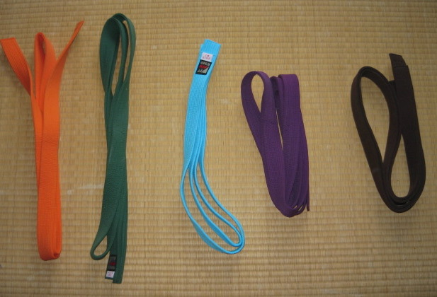 級の帯